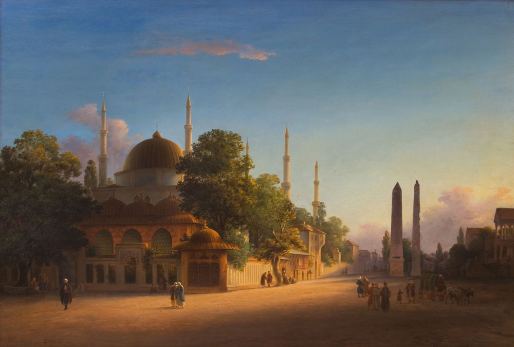 Blick auf die Sultan-Ahmed-Moschee in Istanbul vom ehemaligen Hippodrom mit dem Ägyptischen Obelisk. Öl auf Leinwand, 55,5 x 81 cm